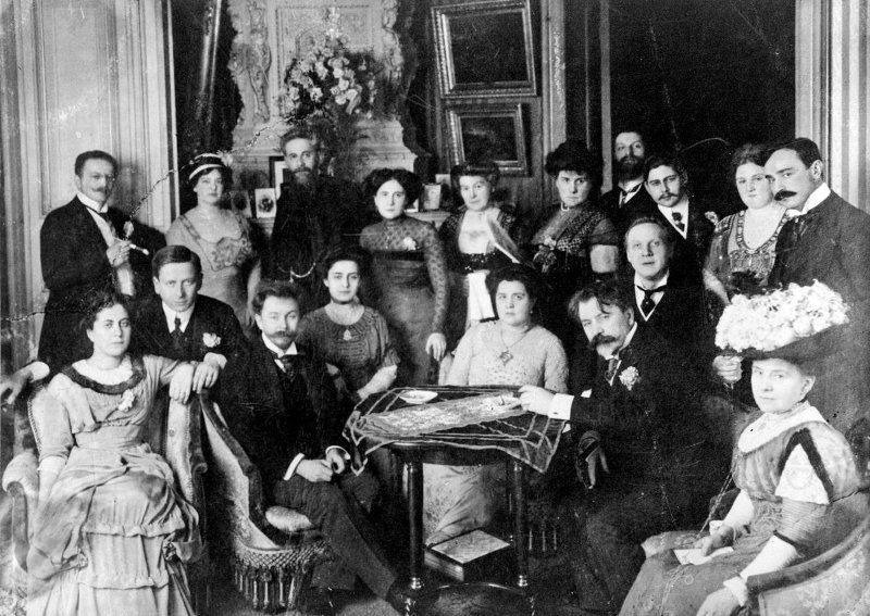 Александр Скрябин в гостях у музыкального критика В.Л.Метцля 14 марта 1910 года, Берлин. Накануне возвращения в Россию. На фотографии среди присутствующих: В.Л.Метцль, Александр и Татьяна Скрябины, Артур Никиш, Фёдор Шаляпин, Сергей и Наталья Кусевицкие и др.Unknown